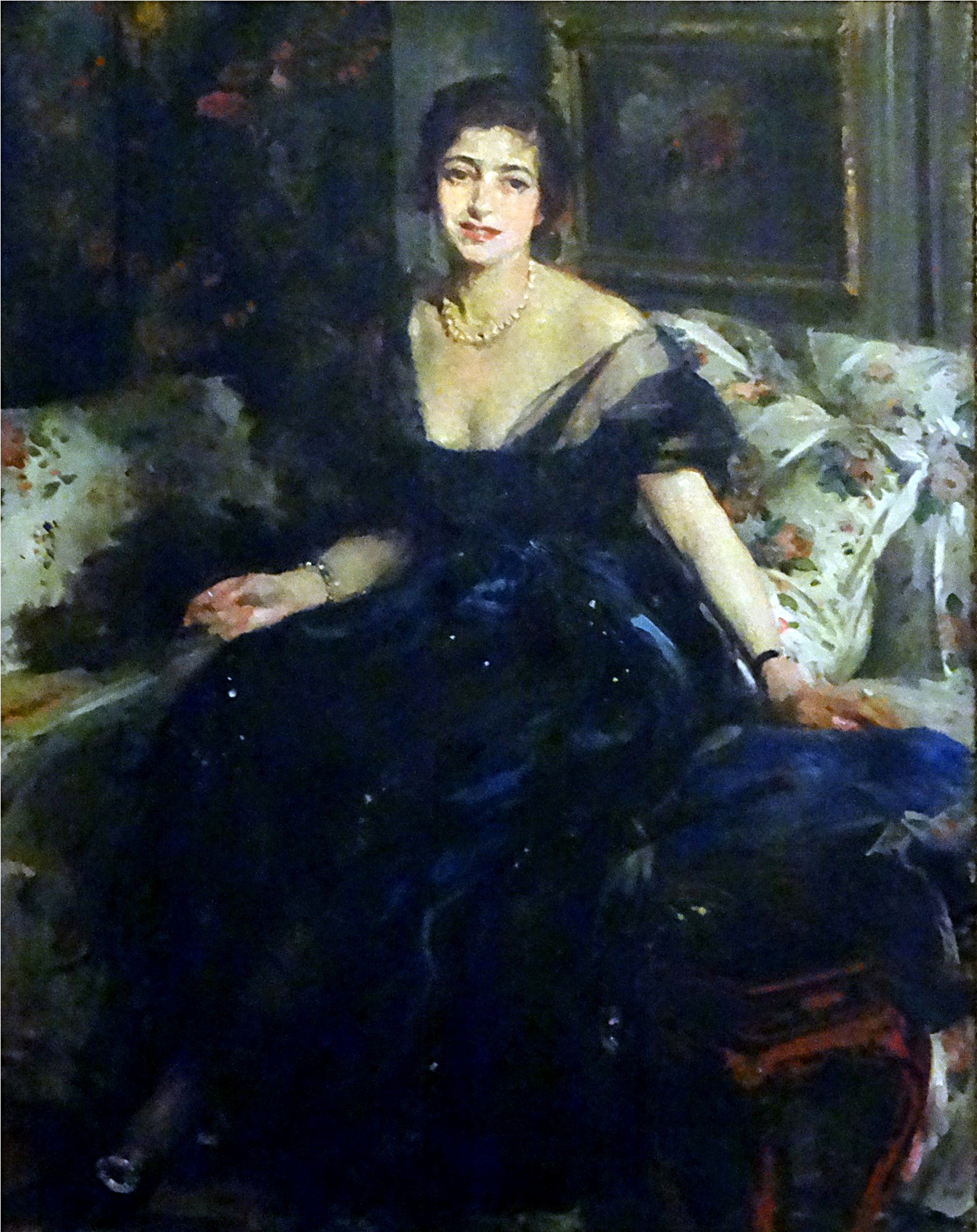 Portrait de Madame Jules Pams par Jacques-Émile Blanche (1861-1942) Hôtel Pams, Perpignan, Pyrénées-Orientales, France. This building is en partie classé, en partie inscrit au titre des Monuments Historiques. .